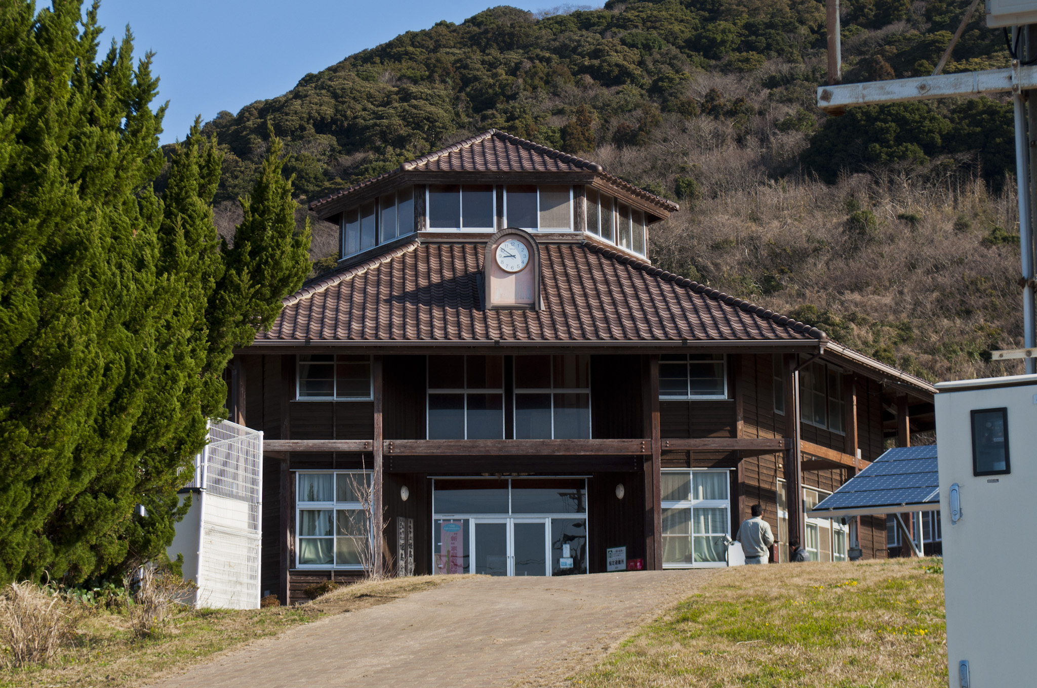 福岡県糸島市姫島の小中学校